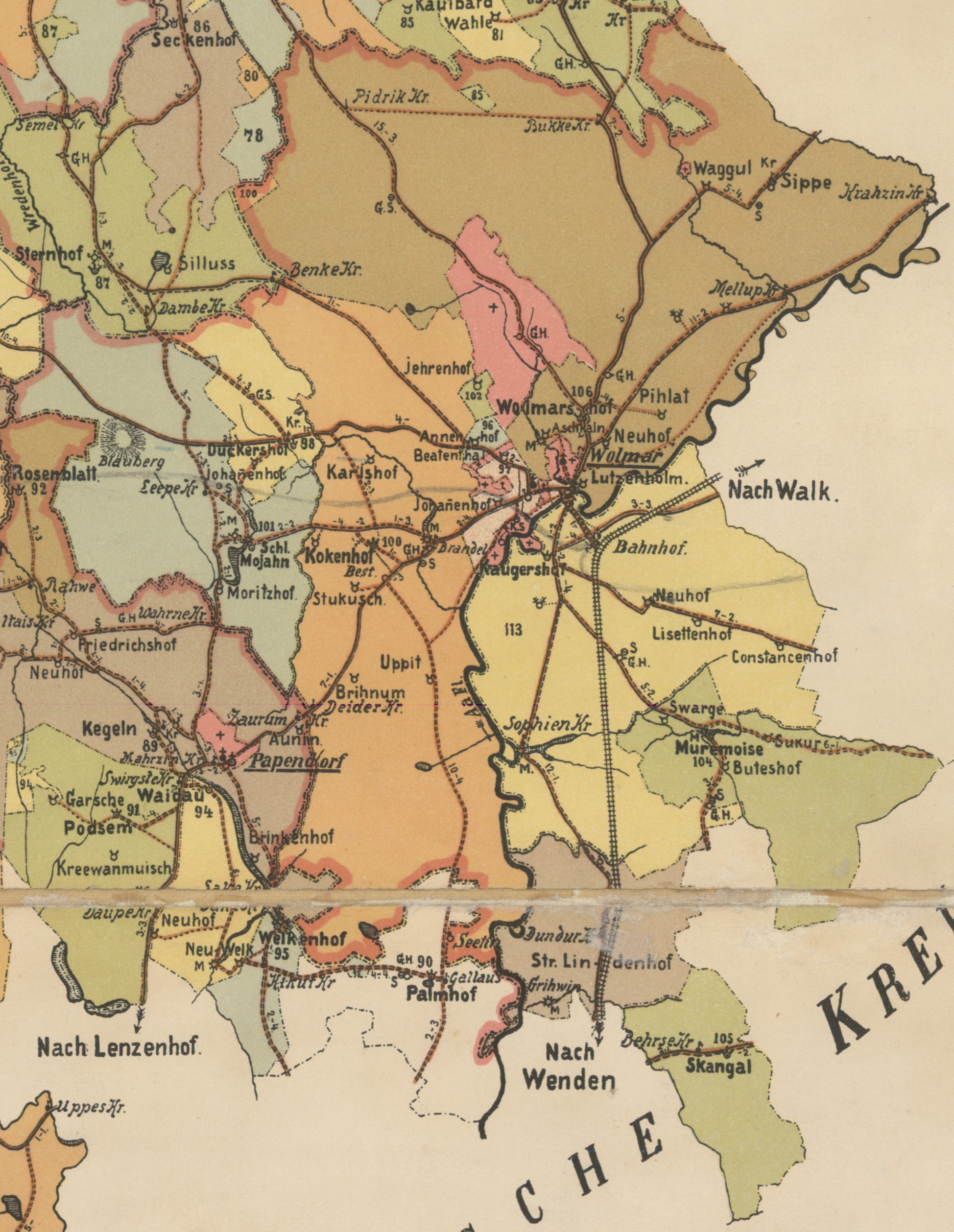 Volmari kihelkonna mõisad 1903. aasta kaardil.